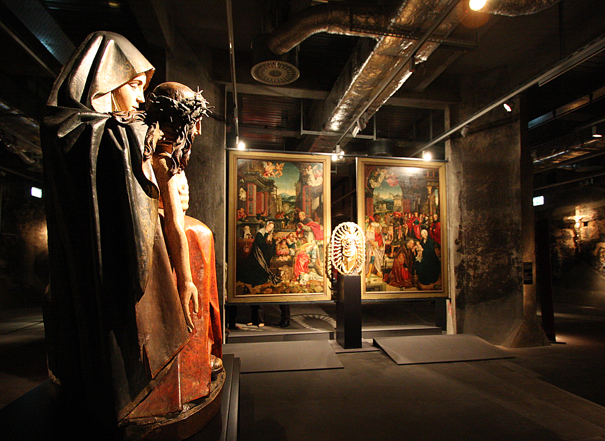 Sonderausstellung „Gold vor Schwarz“ auf Zollverein, Exponate der Essener Domschatzkammer in der ehemaligen Kohlewäscherei.